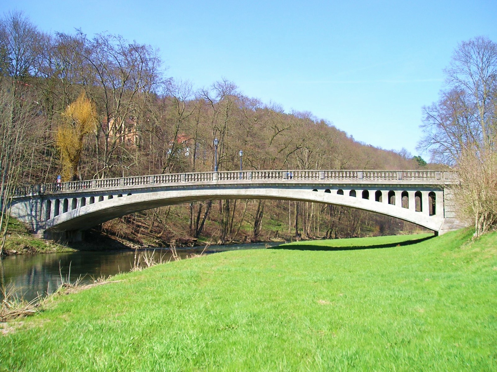 Georgsbrücke in Meiningen, 1899 erbaut von Eduard Fritze und benannt nach Herzog Georg II., eine der ersten Stahlbeton-Brücken Deutschlands.